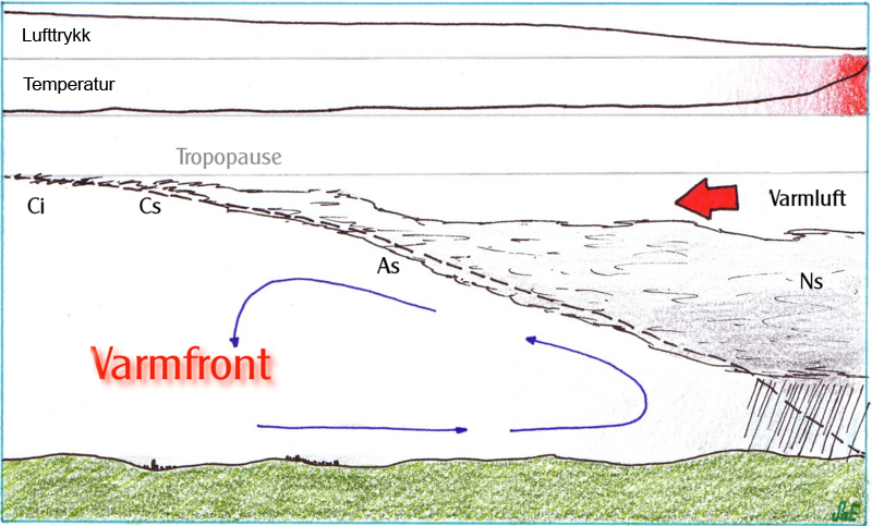 Varmfront Kjelde: Wikipedia Commons - laga av nn::de:Benutzer:LivingShadow. Tekst oversatt til norsk for bruk i nynorsk wiki.